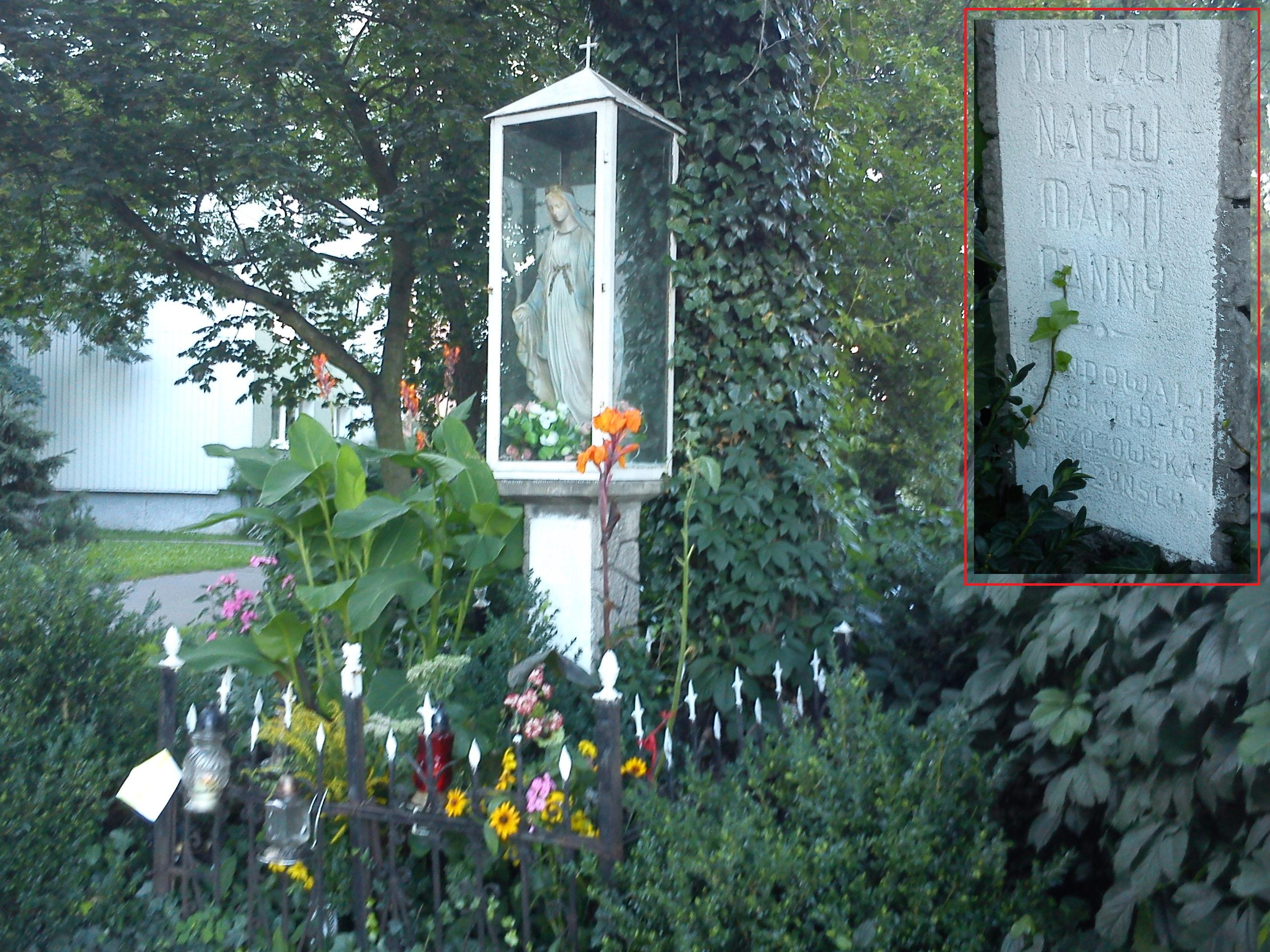 Poznan, Jana III Sobieskiego District, old wayside shrine (1946)